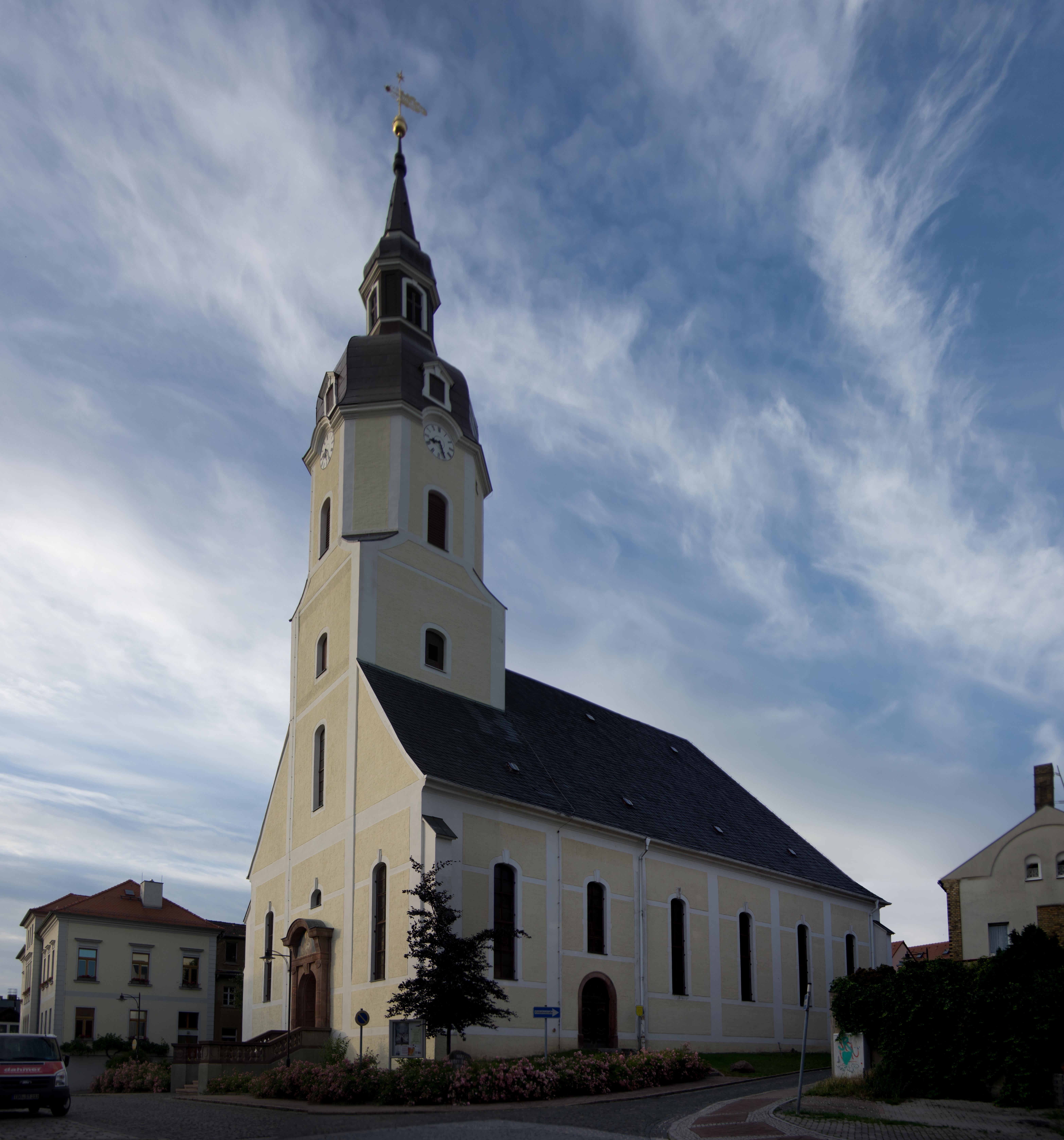 Taucha in Sachsen. Die Kirche steht unter Denkmalschutz.